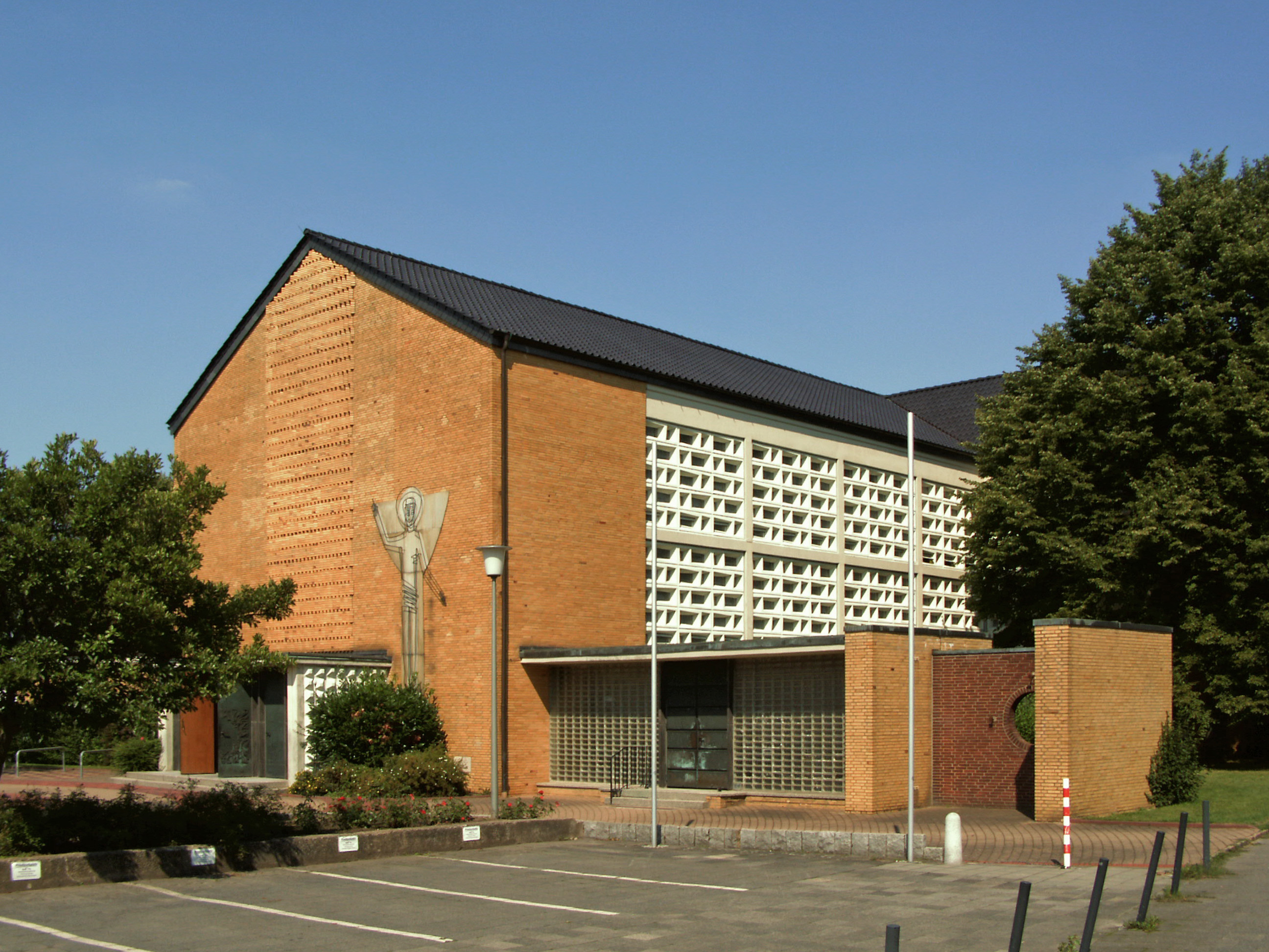 Katholische Kirche Liebfrauen in Hildesheim